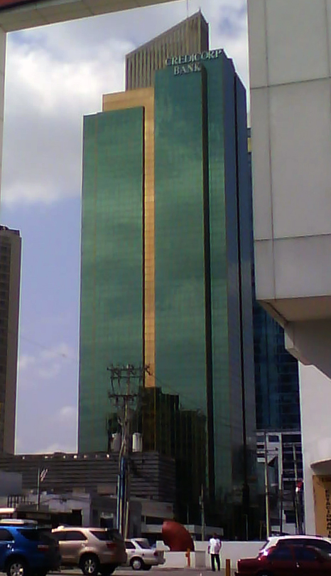 Edificio Credicorp Bank, ciudad de Panamá.